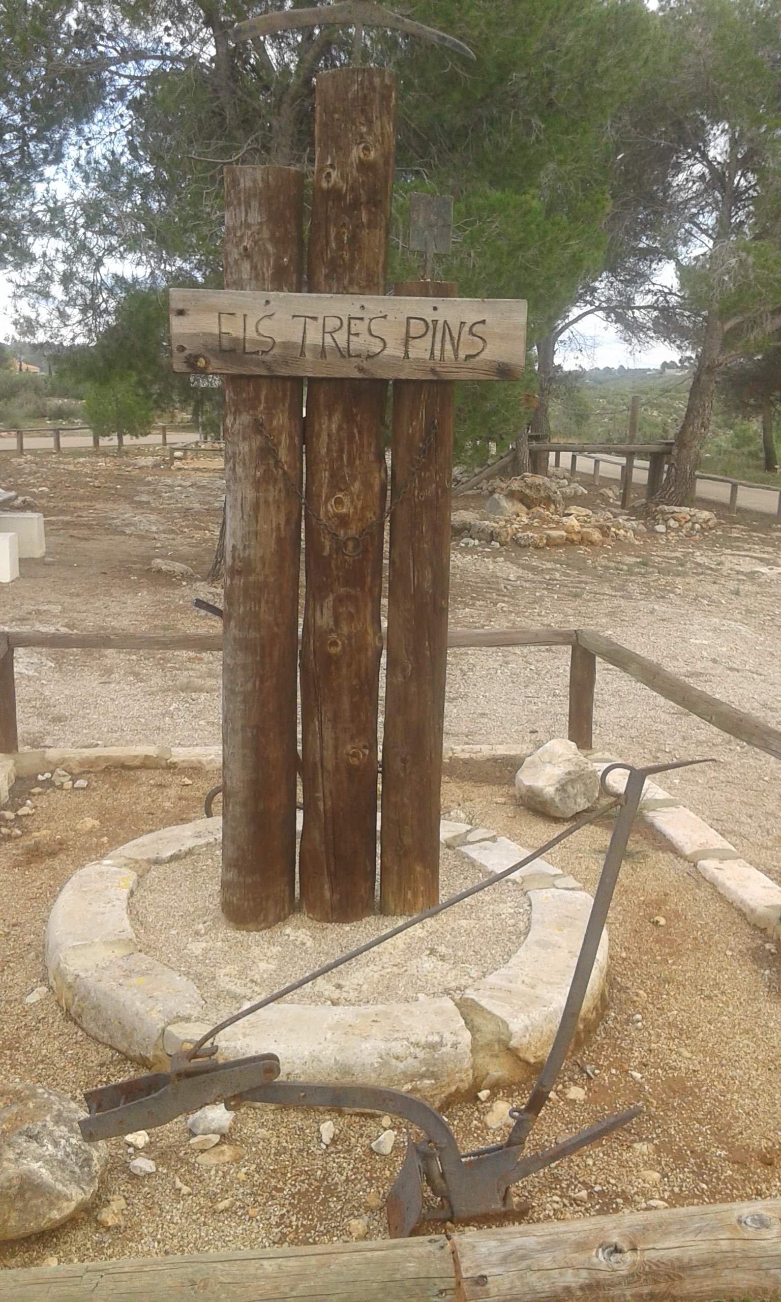 Àrea Recreativa Els Tres Pins inici de la Senda de Matamon PR-CV 324